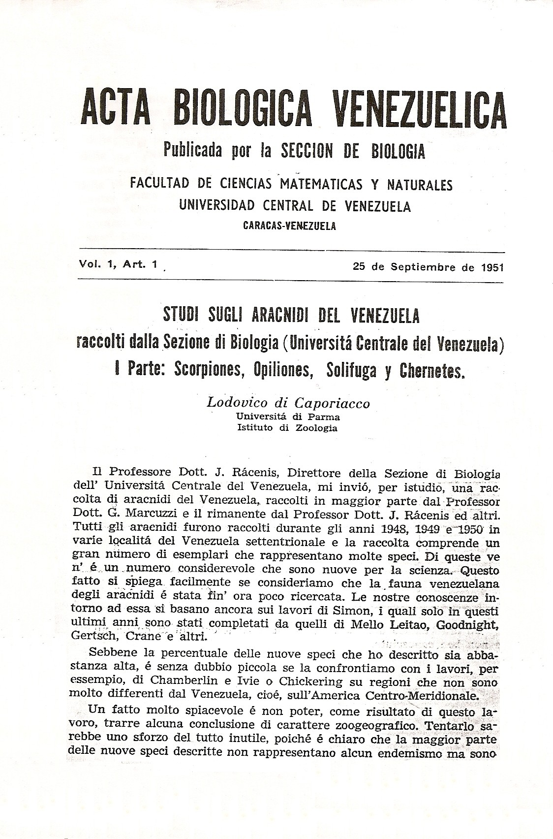 Acta Biologica Venezuelica Vol. 1. Nº 1. 25 de septiembre de 1951